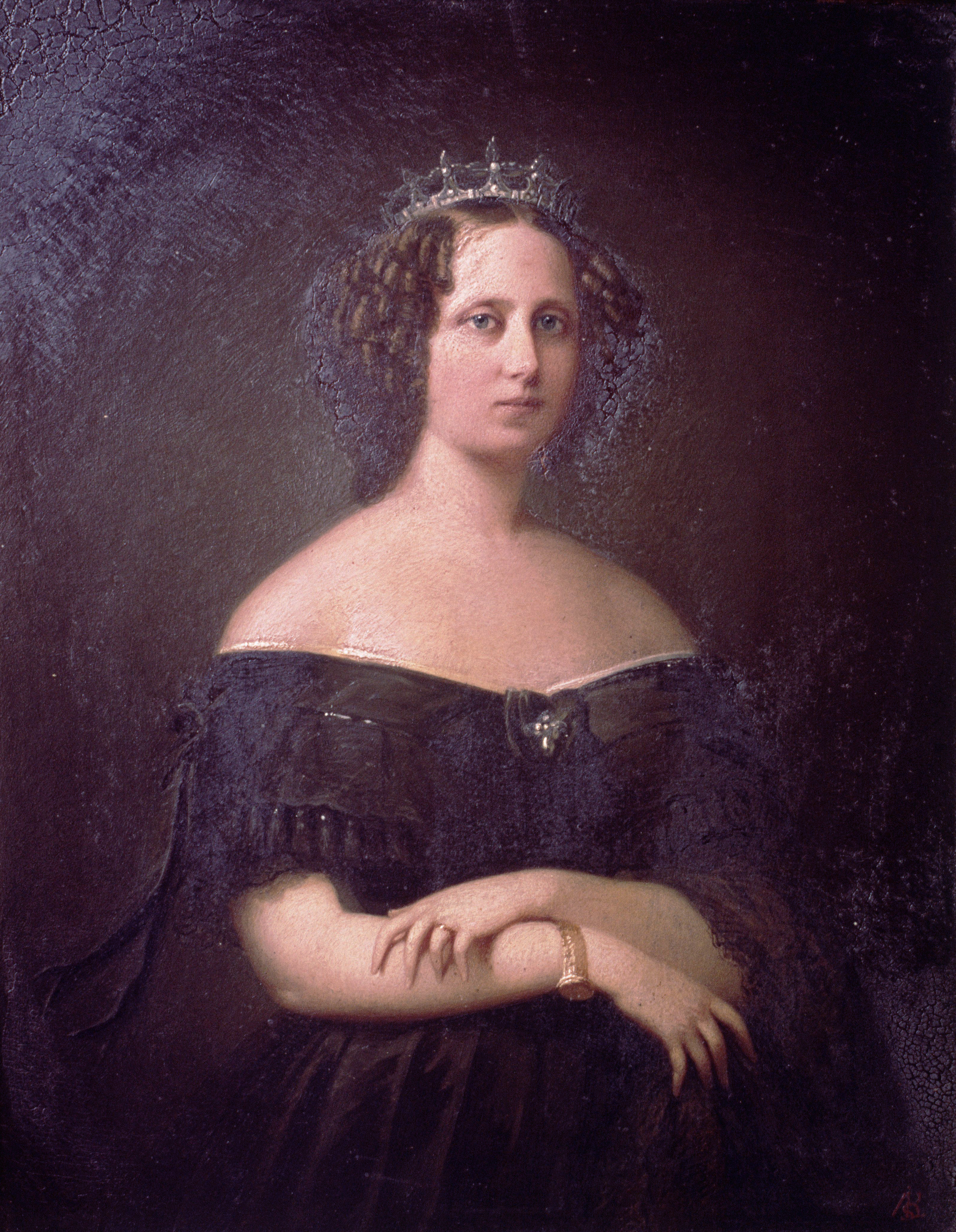 Koningin Sophie (1818-1877)